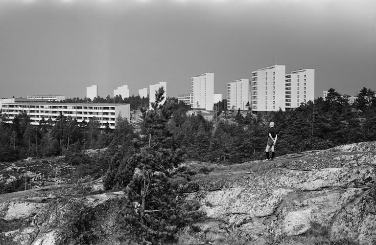 Pihlajamäki. Vasemmalla Graniittitie 11. Etualan korkeat kerrostalot vasemmalta Graniittitie 7, 8, 6, 13, 15.